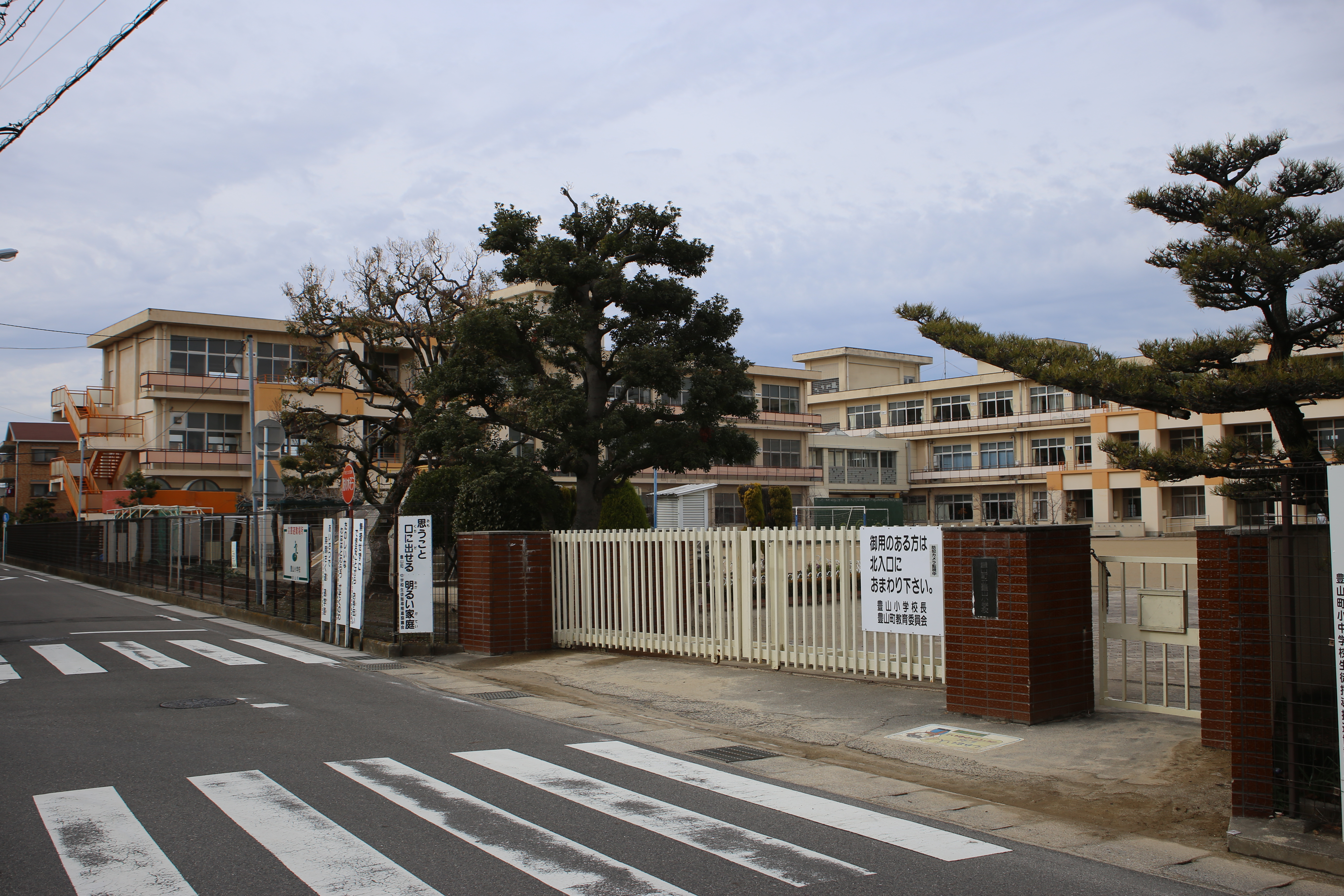 愛知県西春日井郡豊山町大字豊場字中之町の豊山町立豊山小学校を南側公道東側より撮影